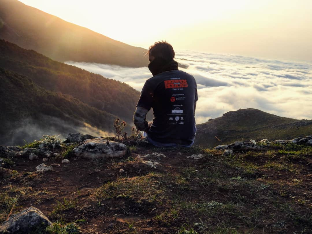 javaherdasht